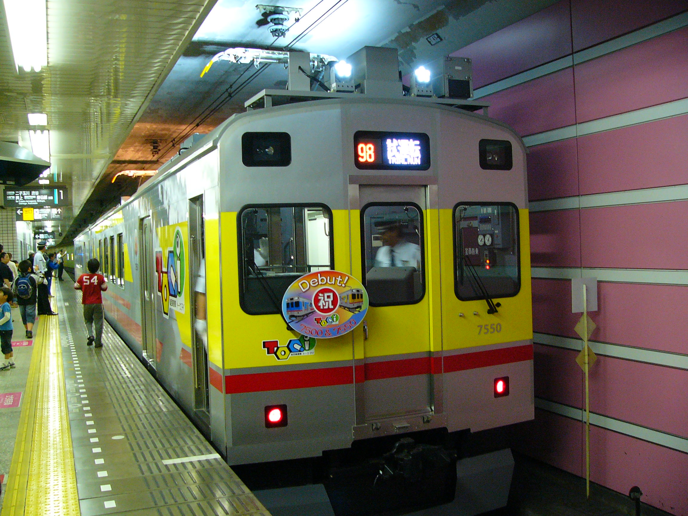 2012年5月6日TOQ-ｉ公開試運転時 中央林間駅